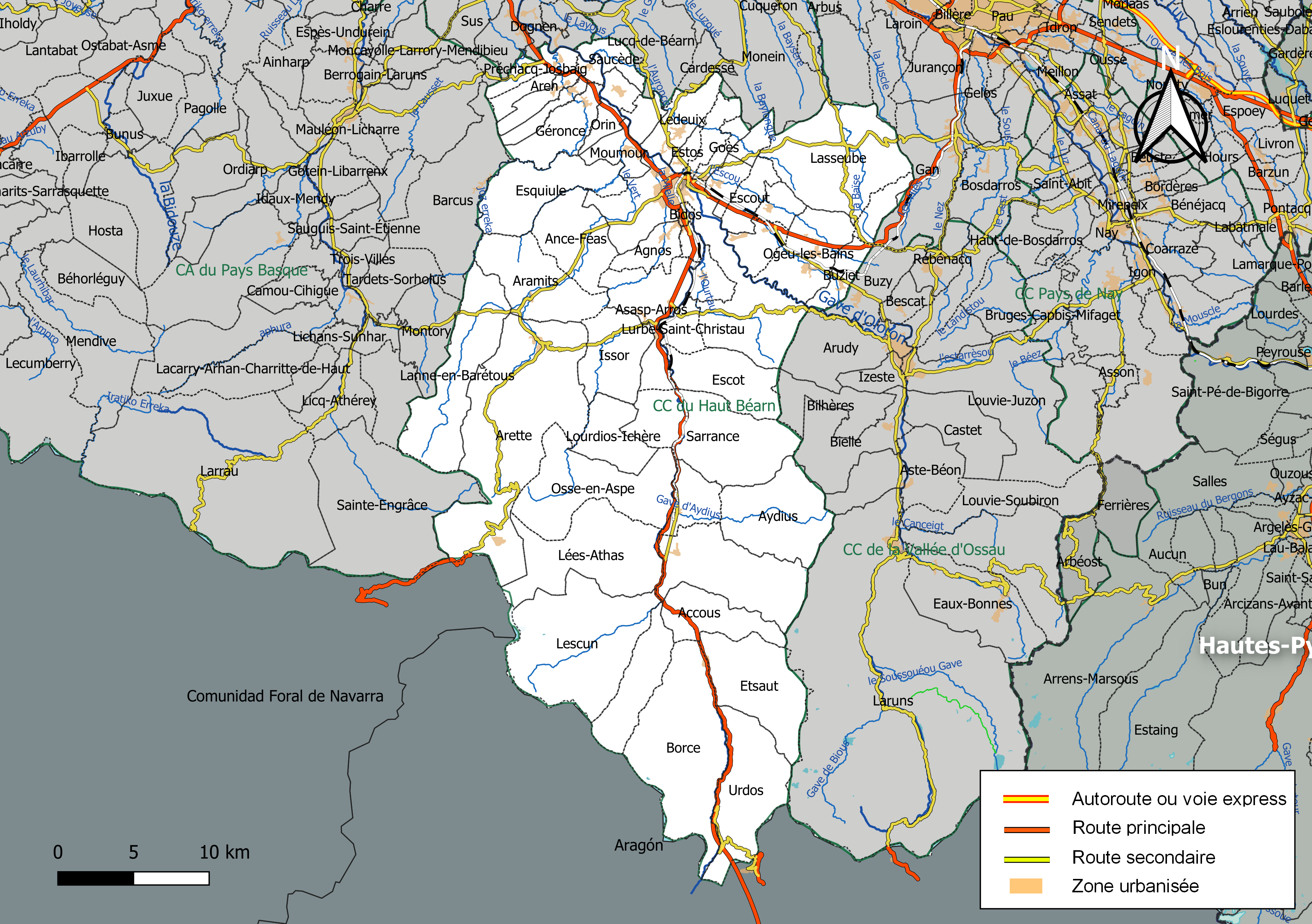 Carte géographique de la Communauté de communes du Haut Béarn, département des Pyrénées-Atlantiques, France. Composition au 1er janvier 2019.